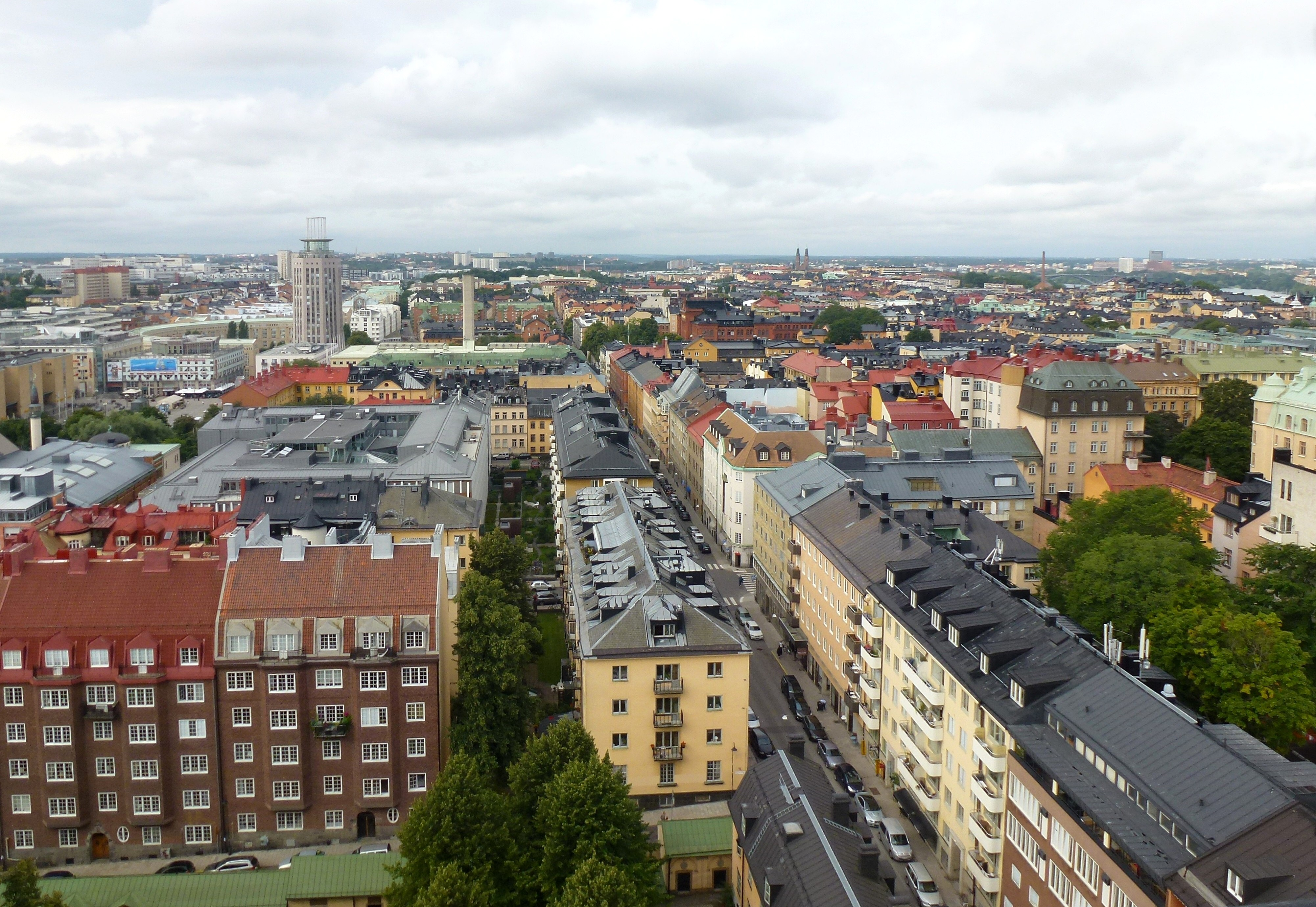 Högbergsgatan mot väst och området för Pelarbacken (mitt i vänstra bildhalvan)